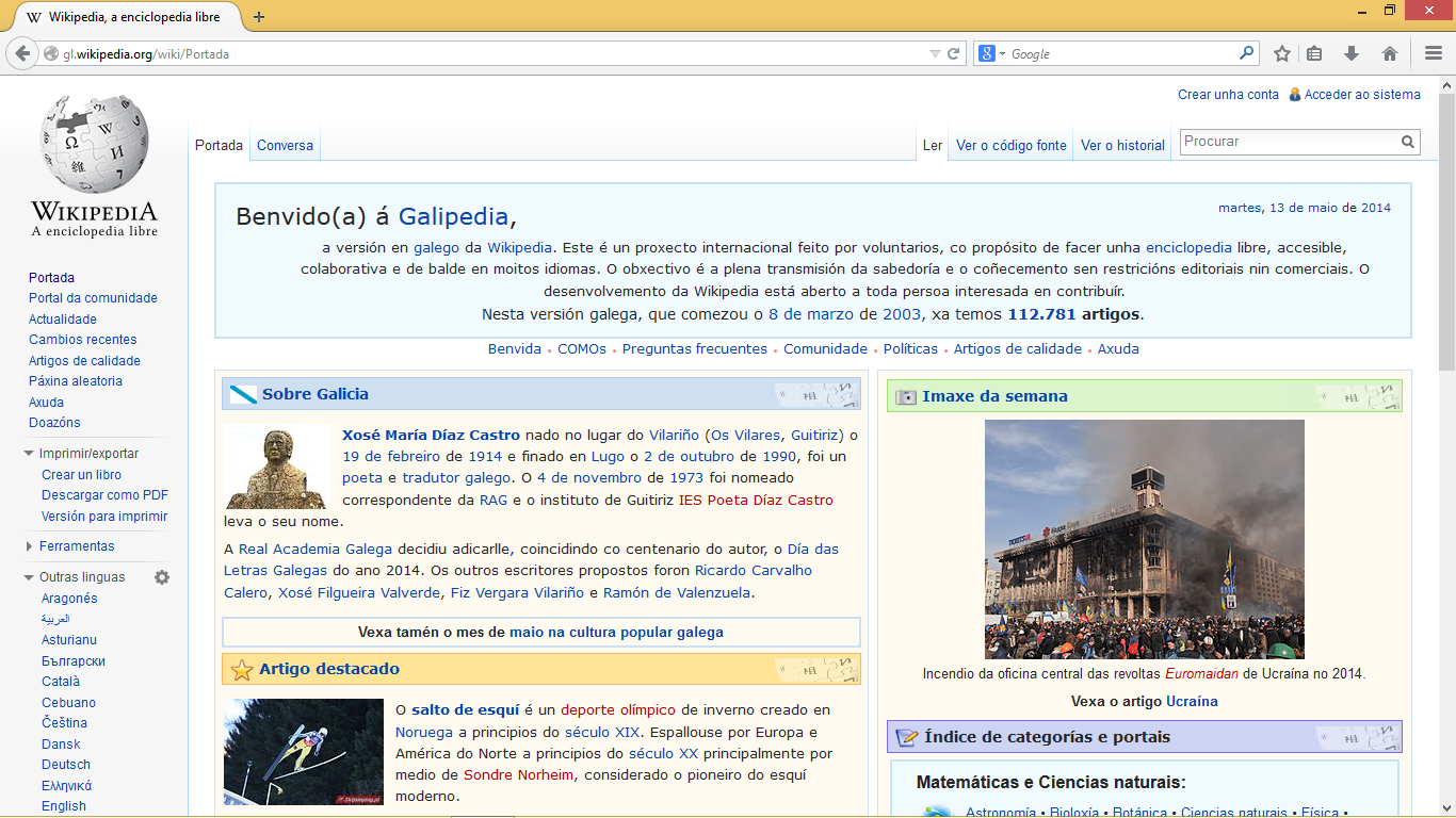 Firefox 29.0.1 en galego en Windows 8.1